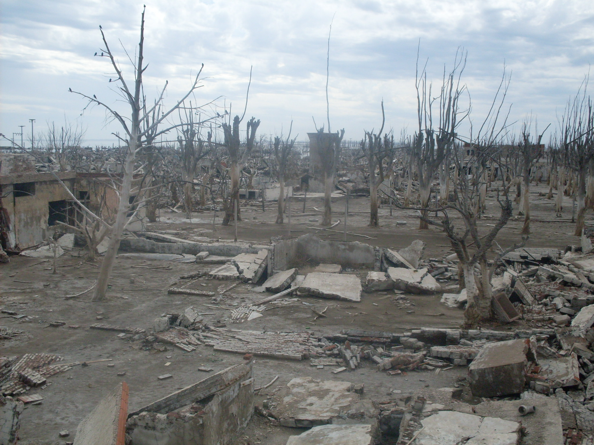 Villa Epecuén, prov de Bs As